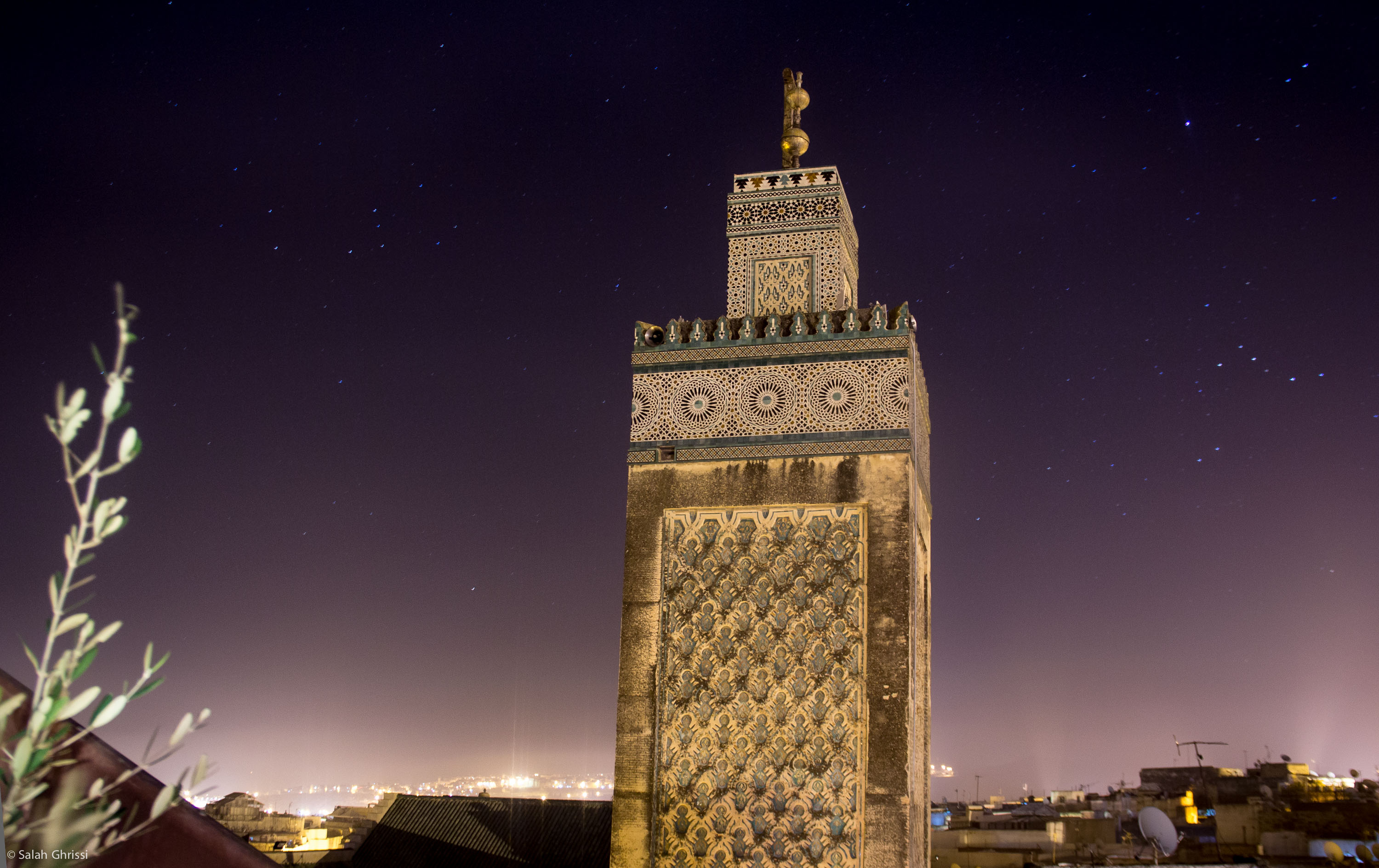 une madrasa édifiée à Fès, au Maroc, entre 1350 et 1355